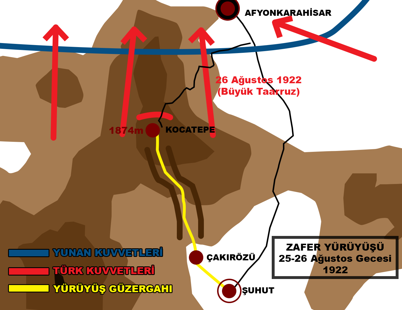 25-26 Ağustos 1922 Gecesi, Atatürk'ün Kocatepeye Yürüyüşü